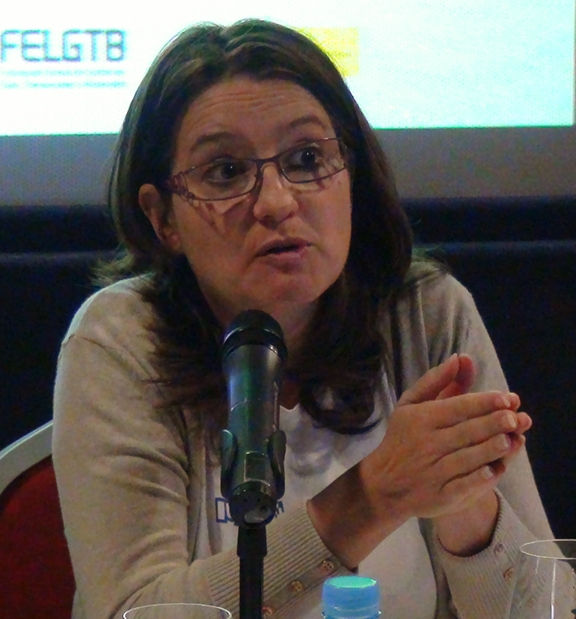 Mònica Oltra, a una conferència sobre els drets LGTB